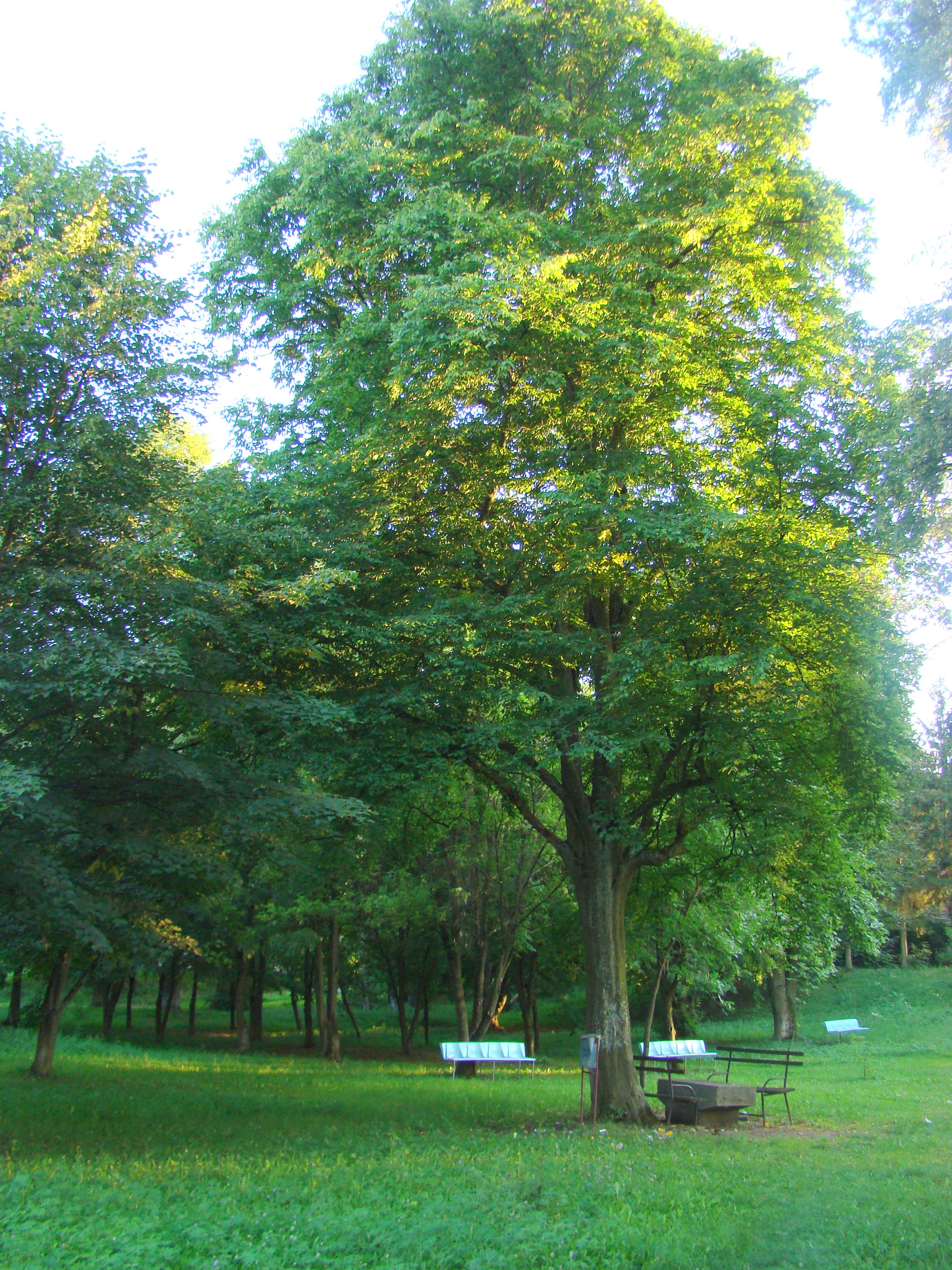 Parcul conacului Zsombory, sat Zimbor; comuna Zimbor, județul Sălaj 02